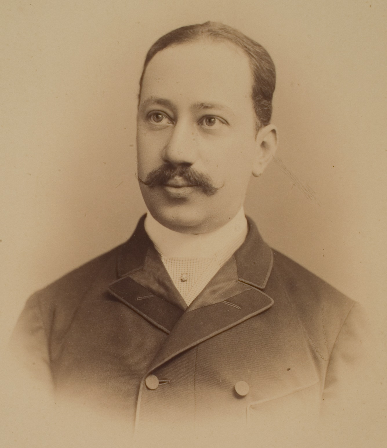 Max von Waldberg, Neuphilologe, 1889–1933 Professor in Heidelberg